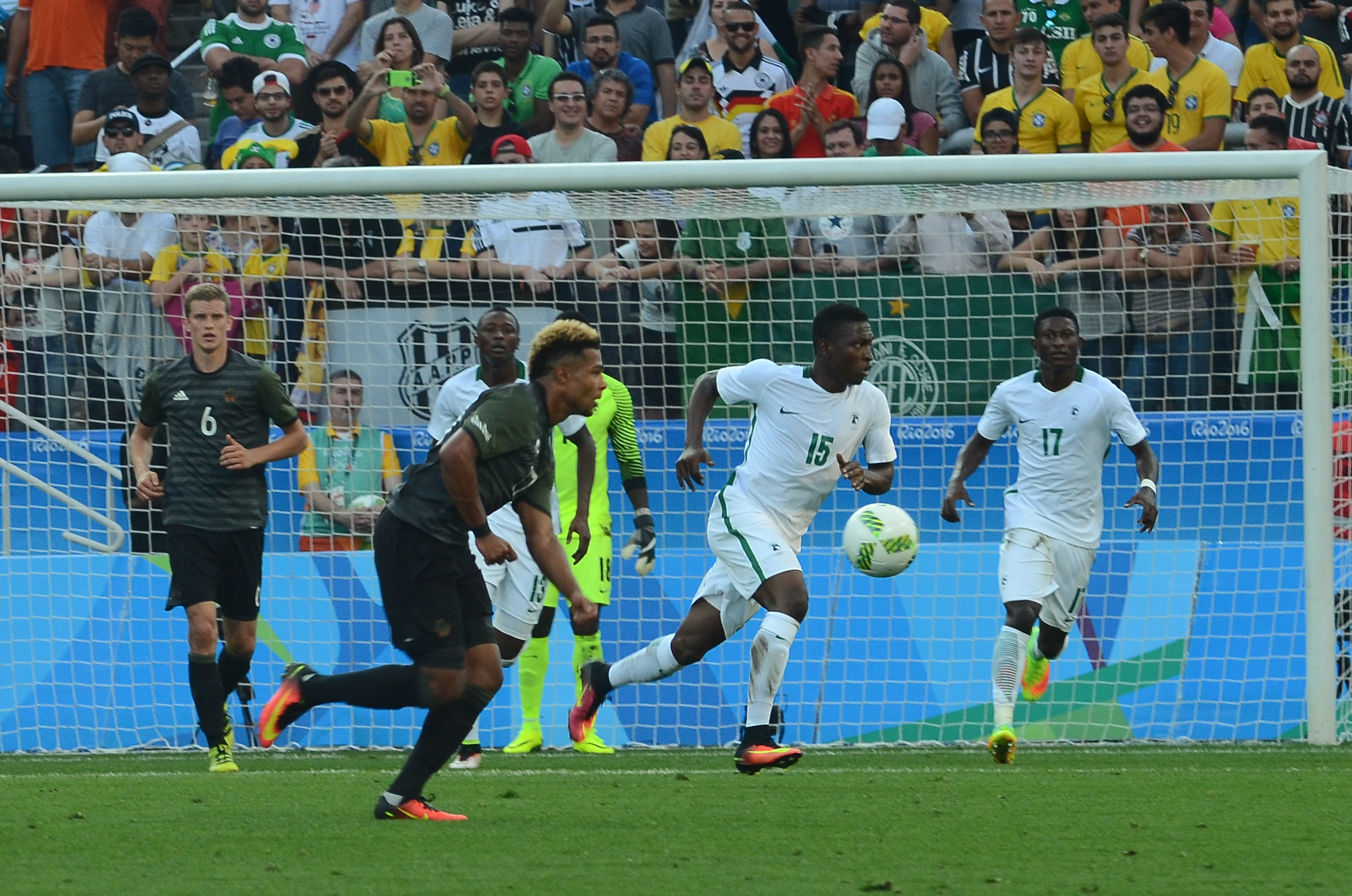 São Paulo - Alemanha vence a Nigéria por 2 a 0 e se classifica para a final na Arena Corinthians (Rovena Rosa/Agência Brasil)